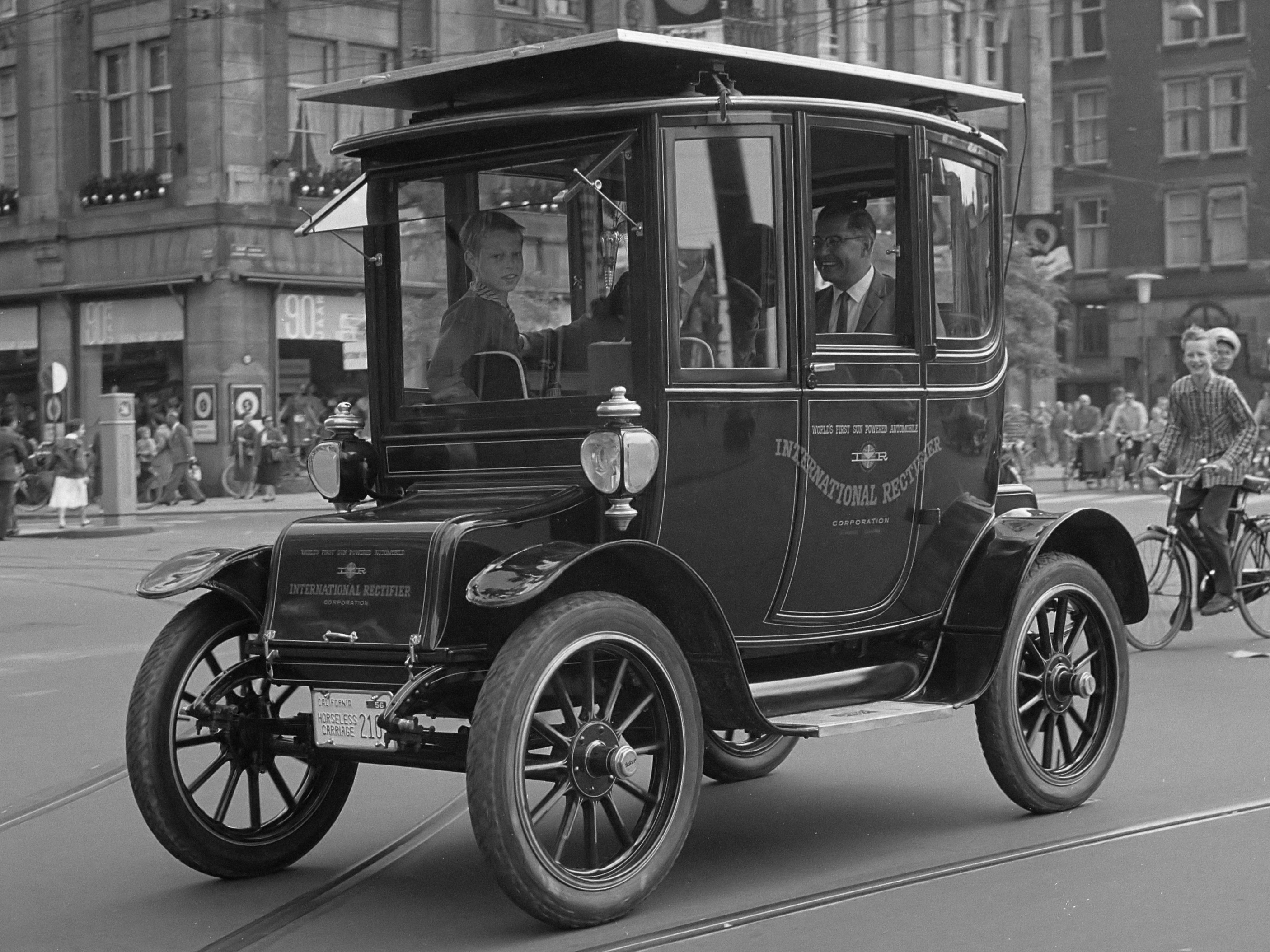 Zonne-auto rijdt in Amsterdam 21 juli 1960